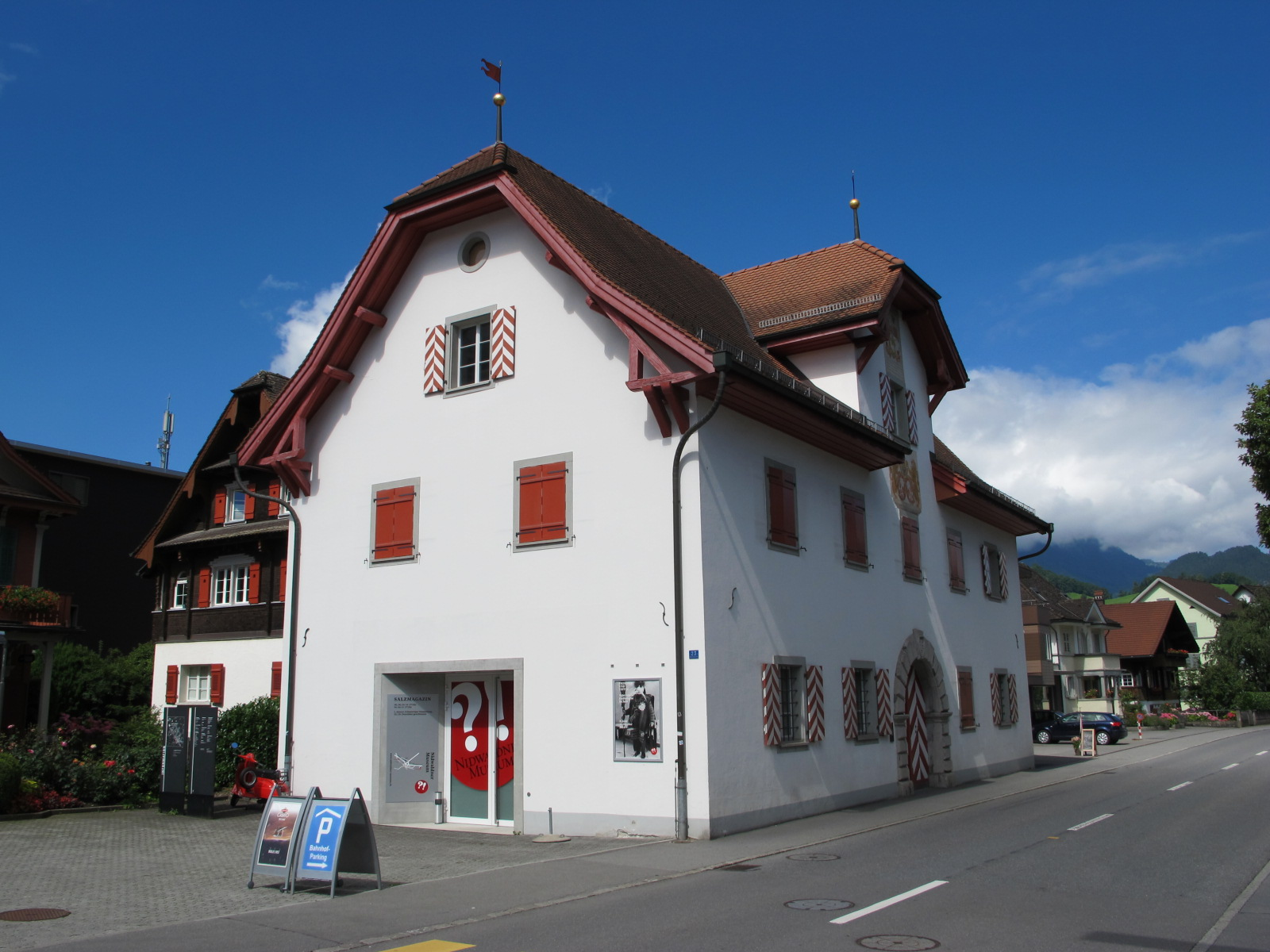 Salzmagazin in Stans, Nidwaldner Museum